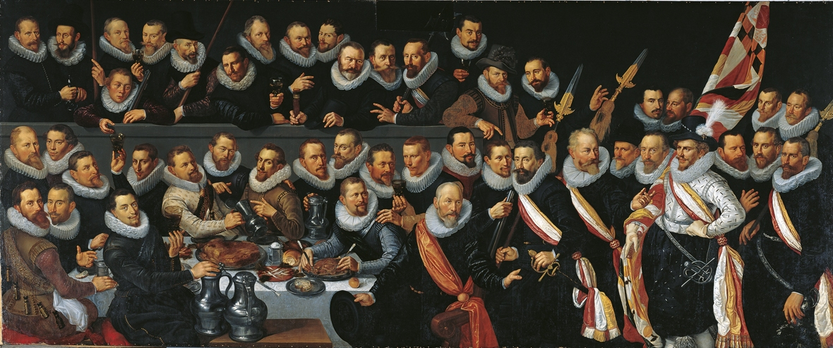 Maaltijd van officieren en onderofficieren van de Cluveniersdoelenlabel QS:Lnl,"Maaltijd van officieren en onderofficieren van de Cluveniersdoelen"